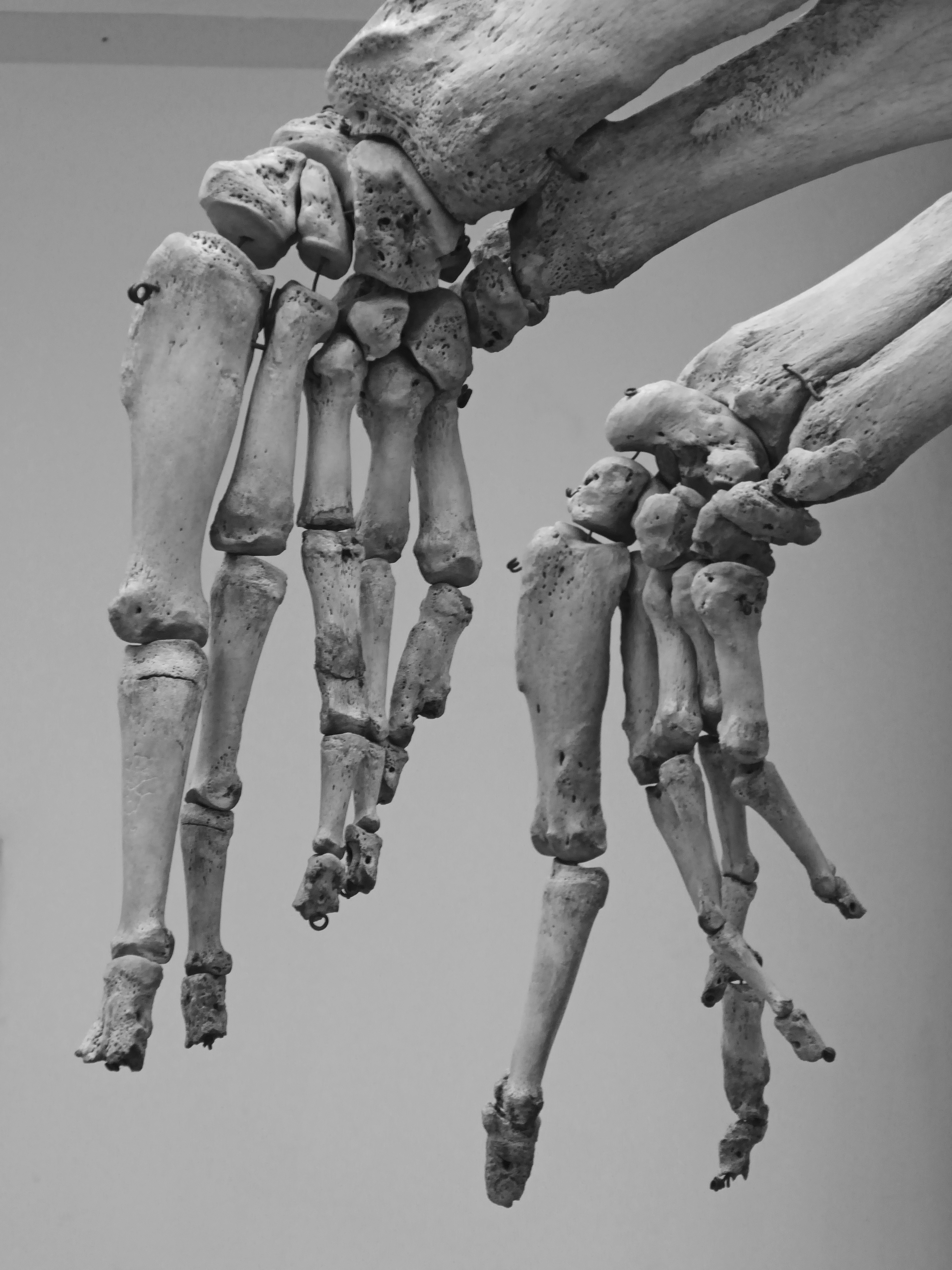 Vorderfüße Seelöwe